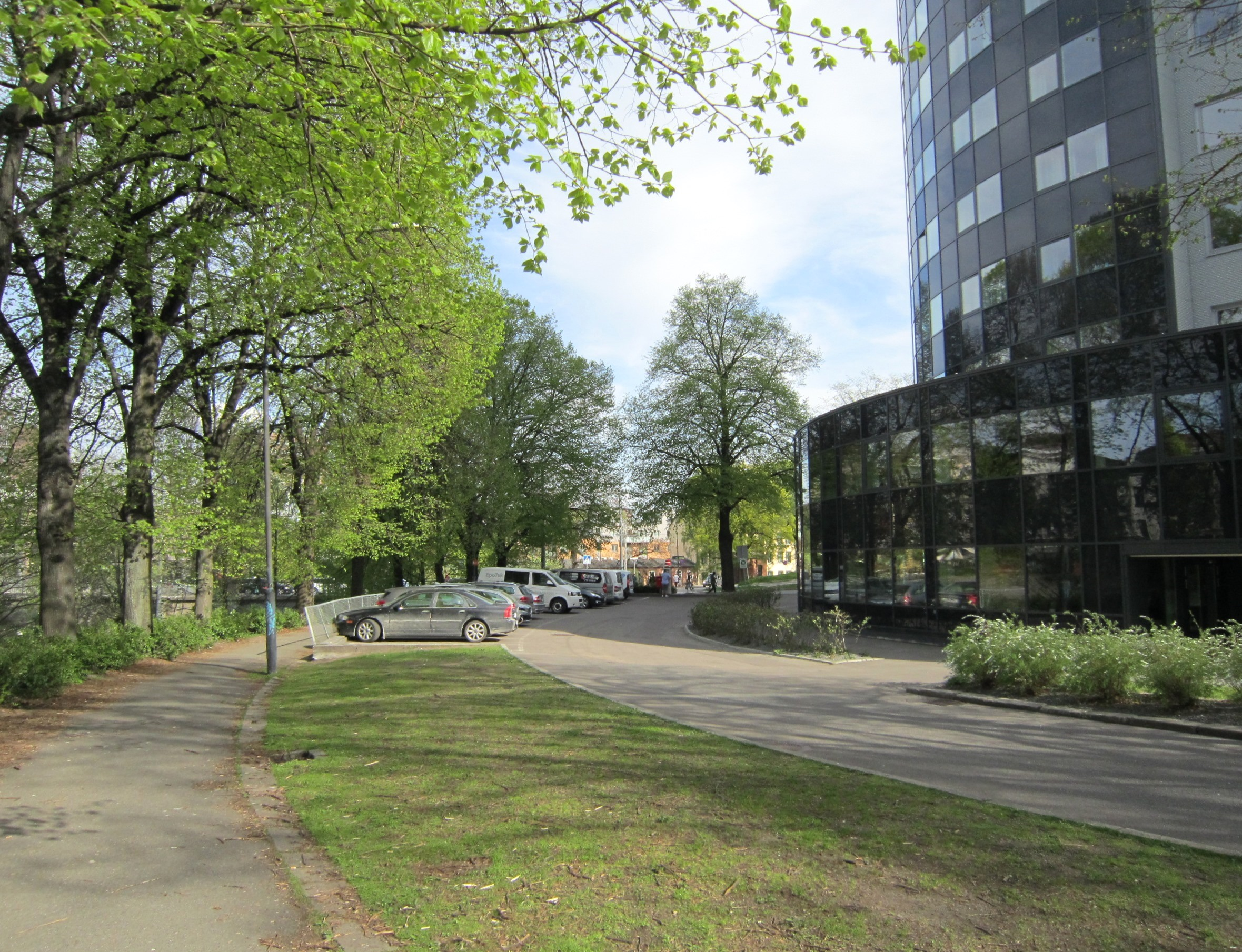 Axel Maurers vei i Oslo